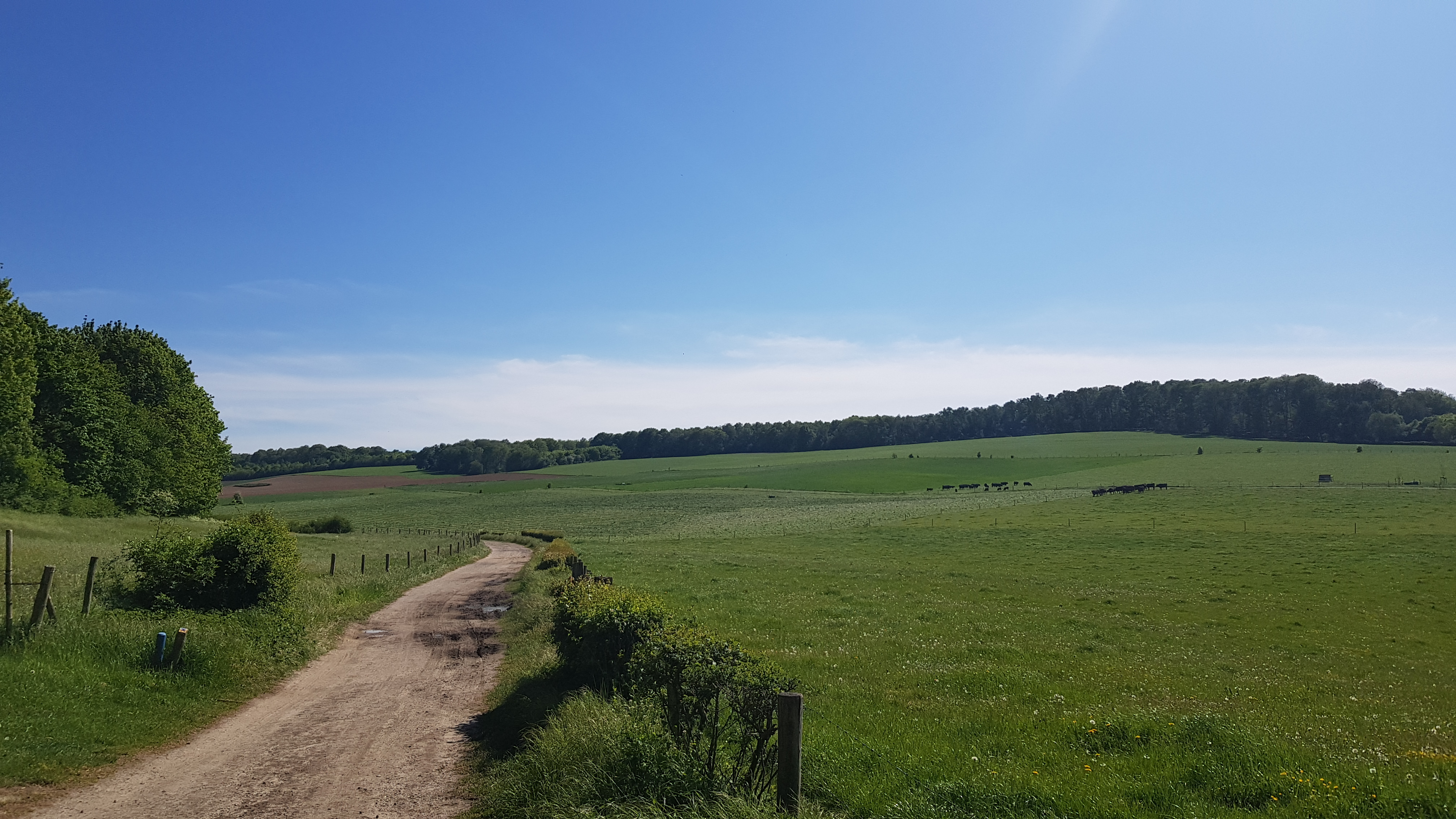 Pesakerdal, Pesaken, Nederland